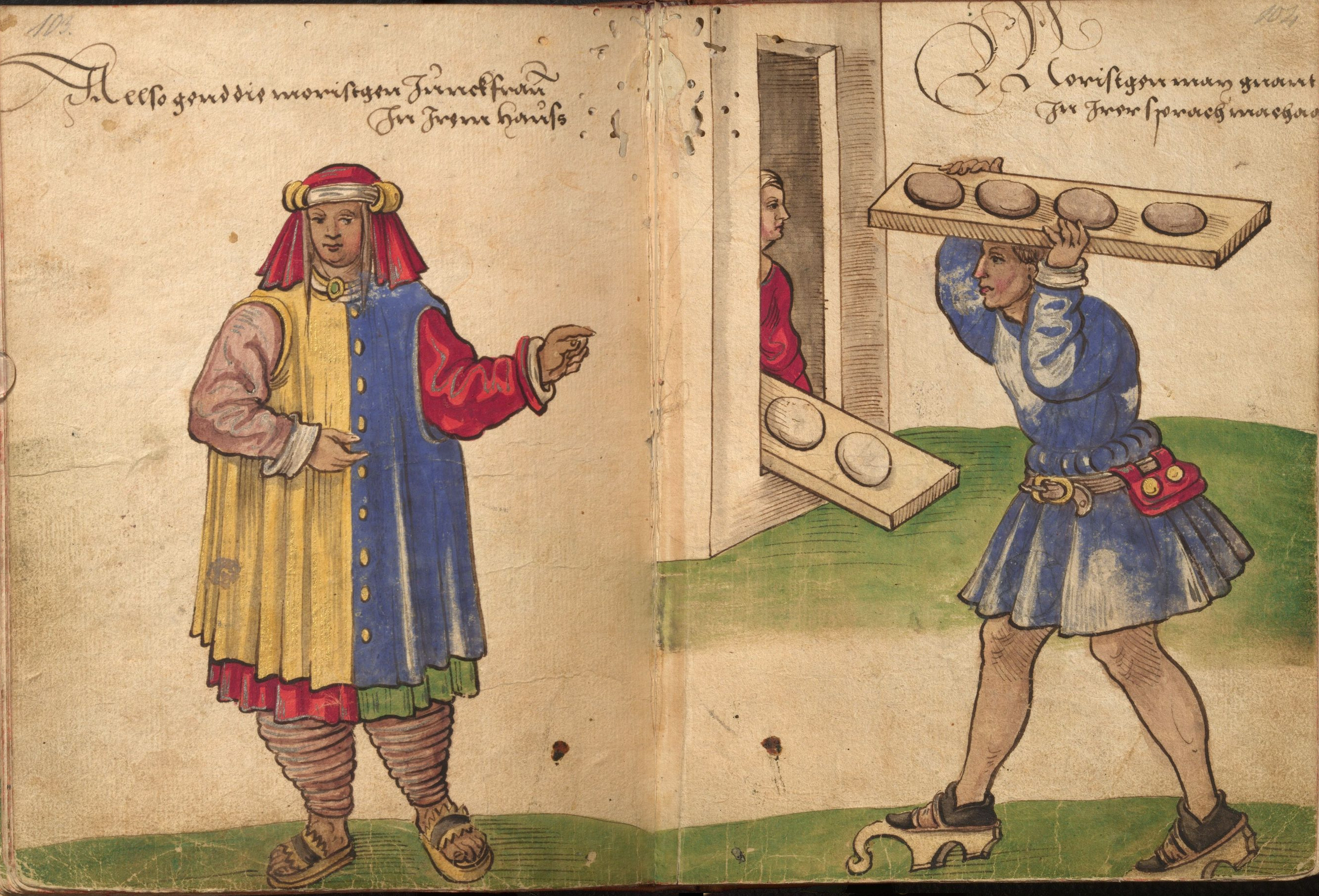 "Trachtenbuch" des Christoph Weiditz, Germanisches Nationalmuseum Nürnberg, Hs. 22474. Bl. 103–104 Haustracht der Morisken-Mädchen / Moriske als Brotträger.